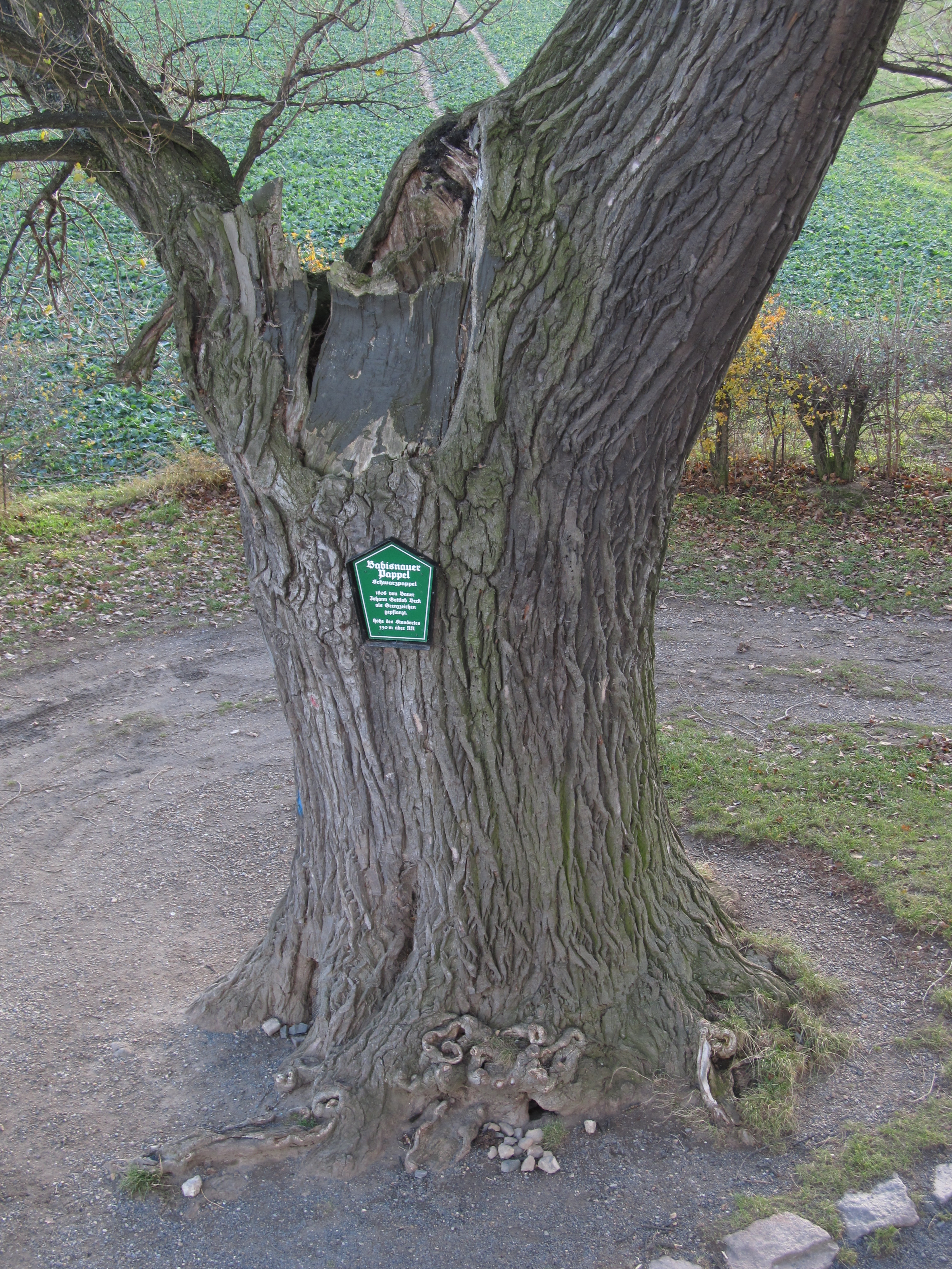 Stamm der Babisnauer Pappel, Gemeinde Kreischa, Landkreis Sächsische Schweiz-Osterzgebirge